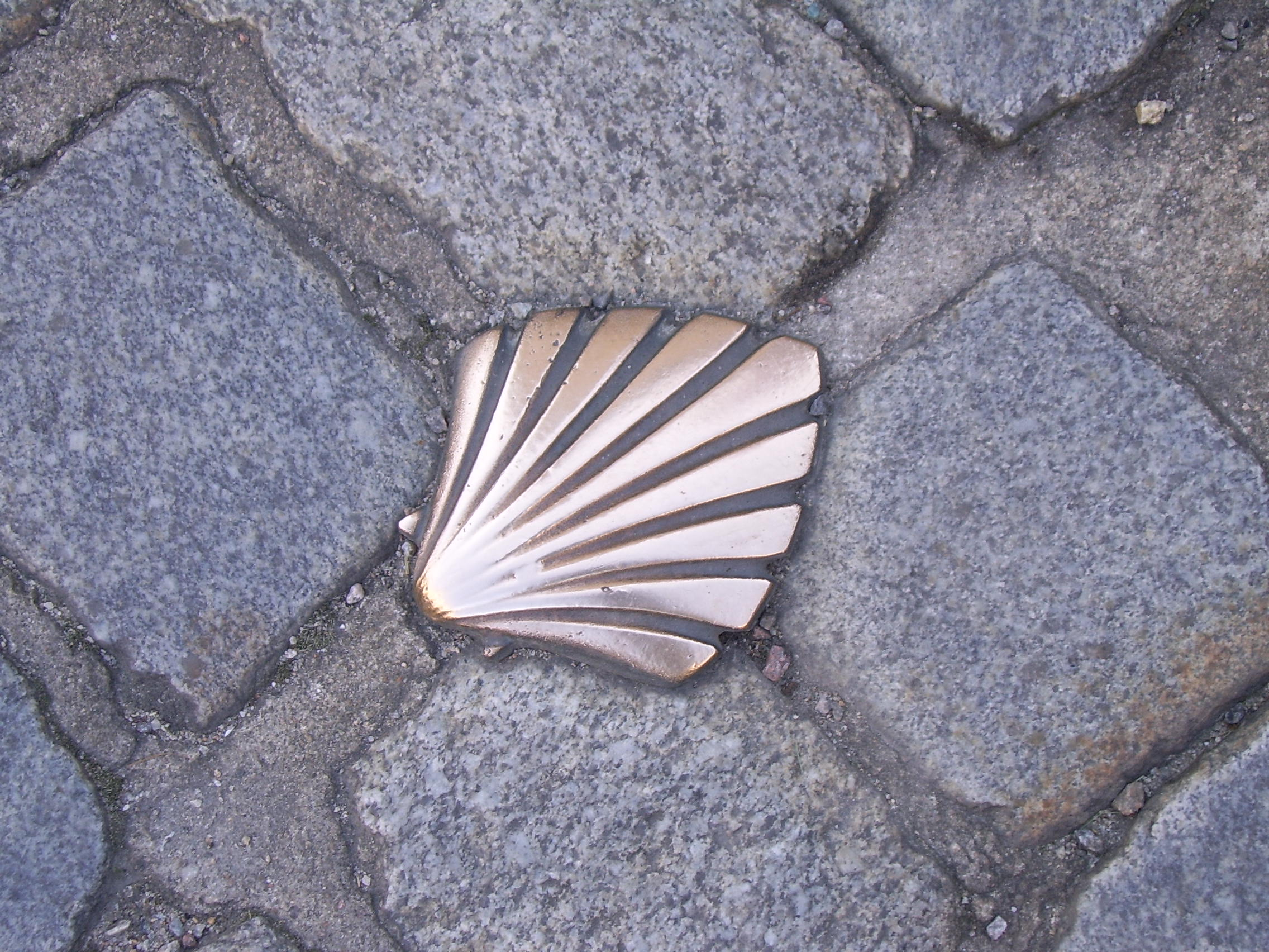 Coquillage en métal dans une rue de Limoges, France, symbolisant le pélerinage de Saint-Jacques de Compostelle